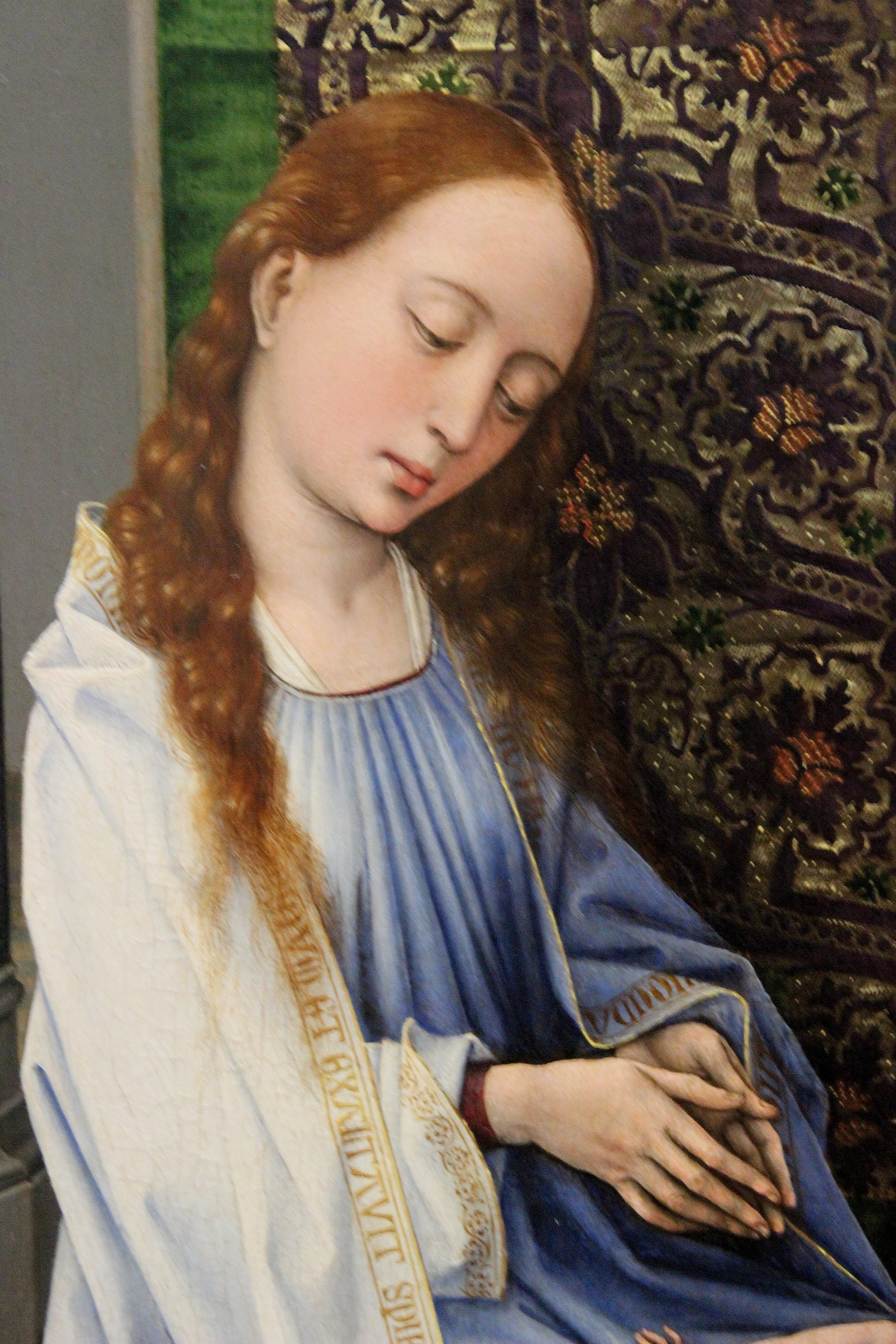 Berlín, Gemäldegalerie. Retablo de la Cartuja de Miraflores, Rogier van der Weyden.